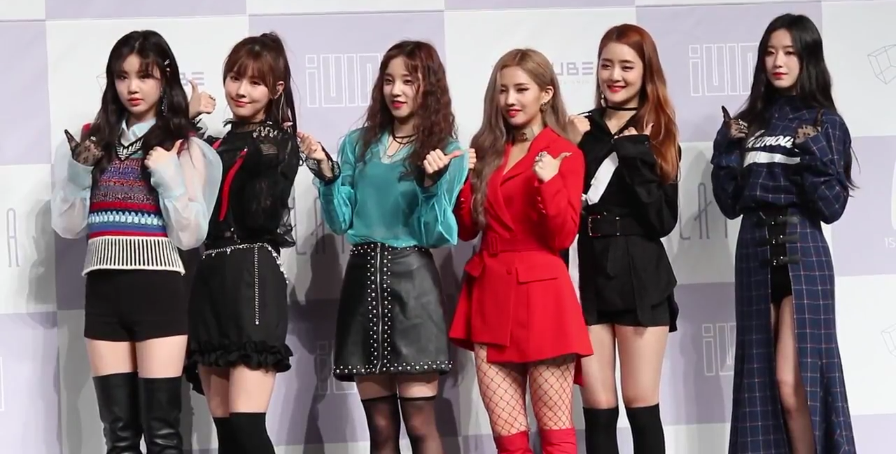 (G)I-DLE no horário de fotos do 'Latata' Showcase em 2 de maio de 2018